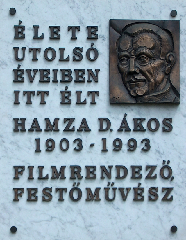 Hamza Múzeum emléktáblája, Jászberény